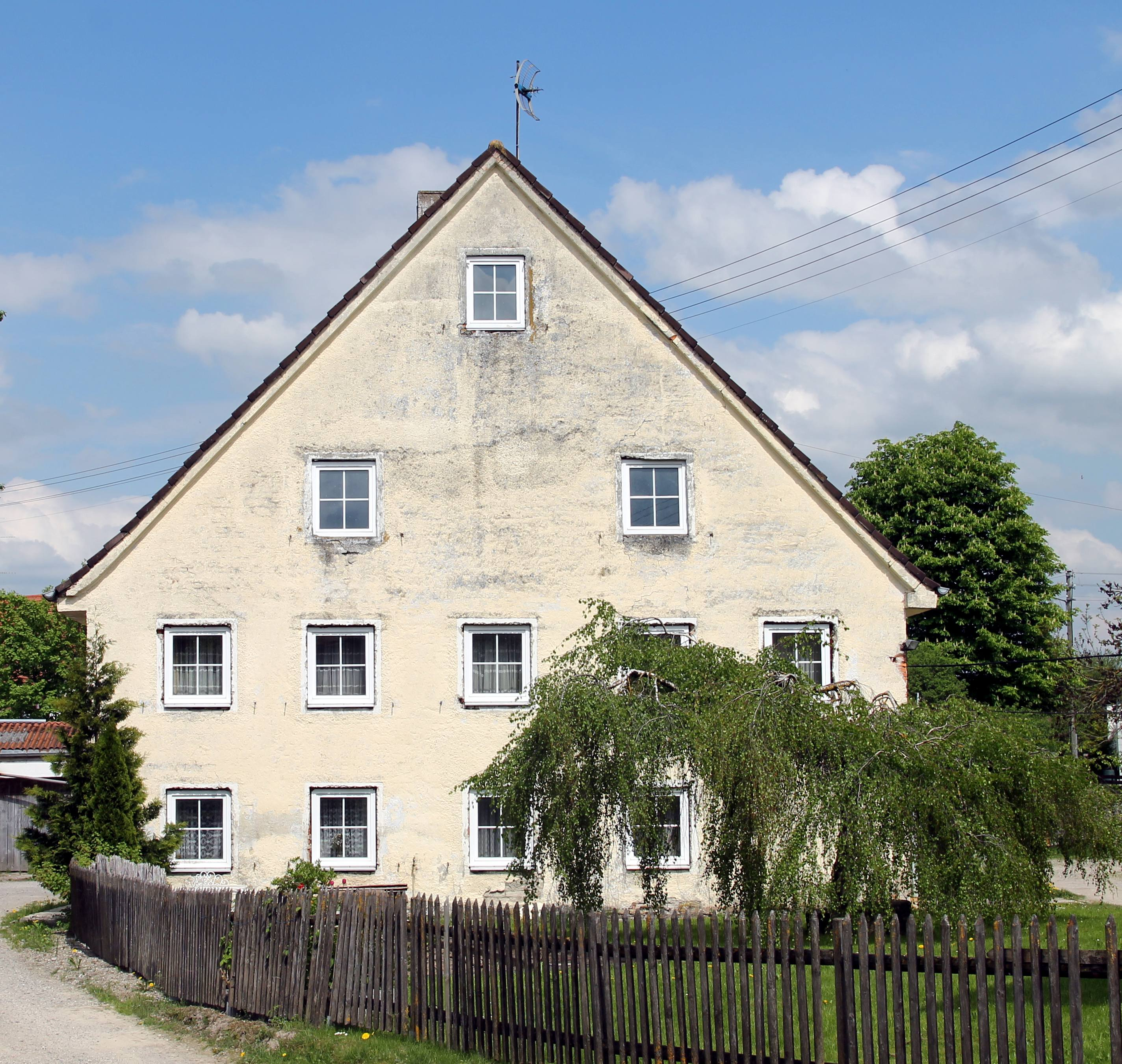 Baudenkmal in Amberg - Mühlenstraße